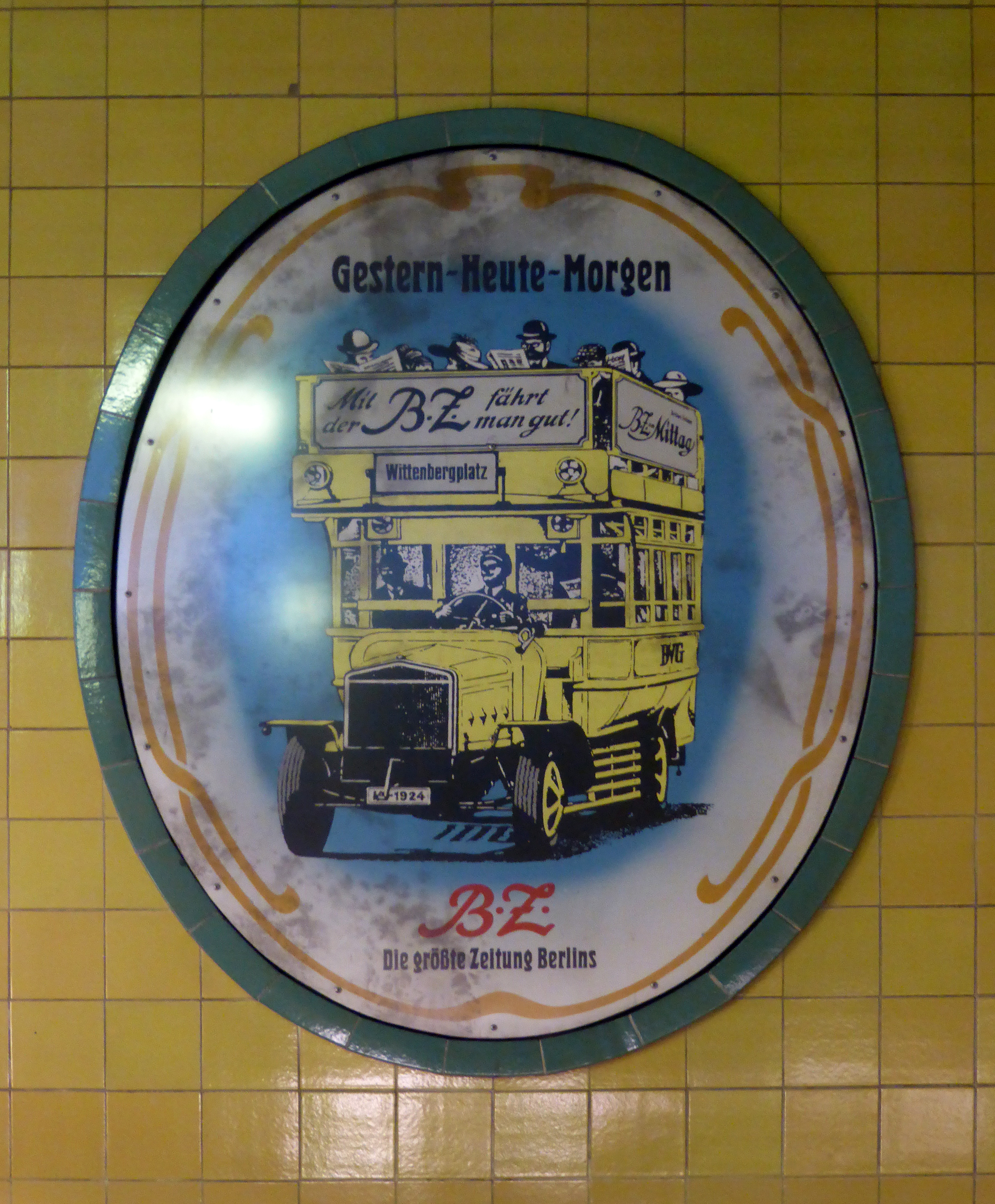 Werbefläche (B.Z.) im U-Bahnhof Wittenbergplatz, Berlin.